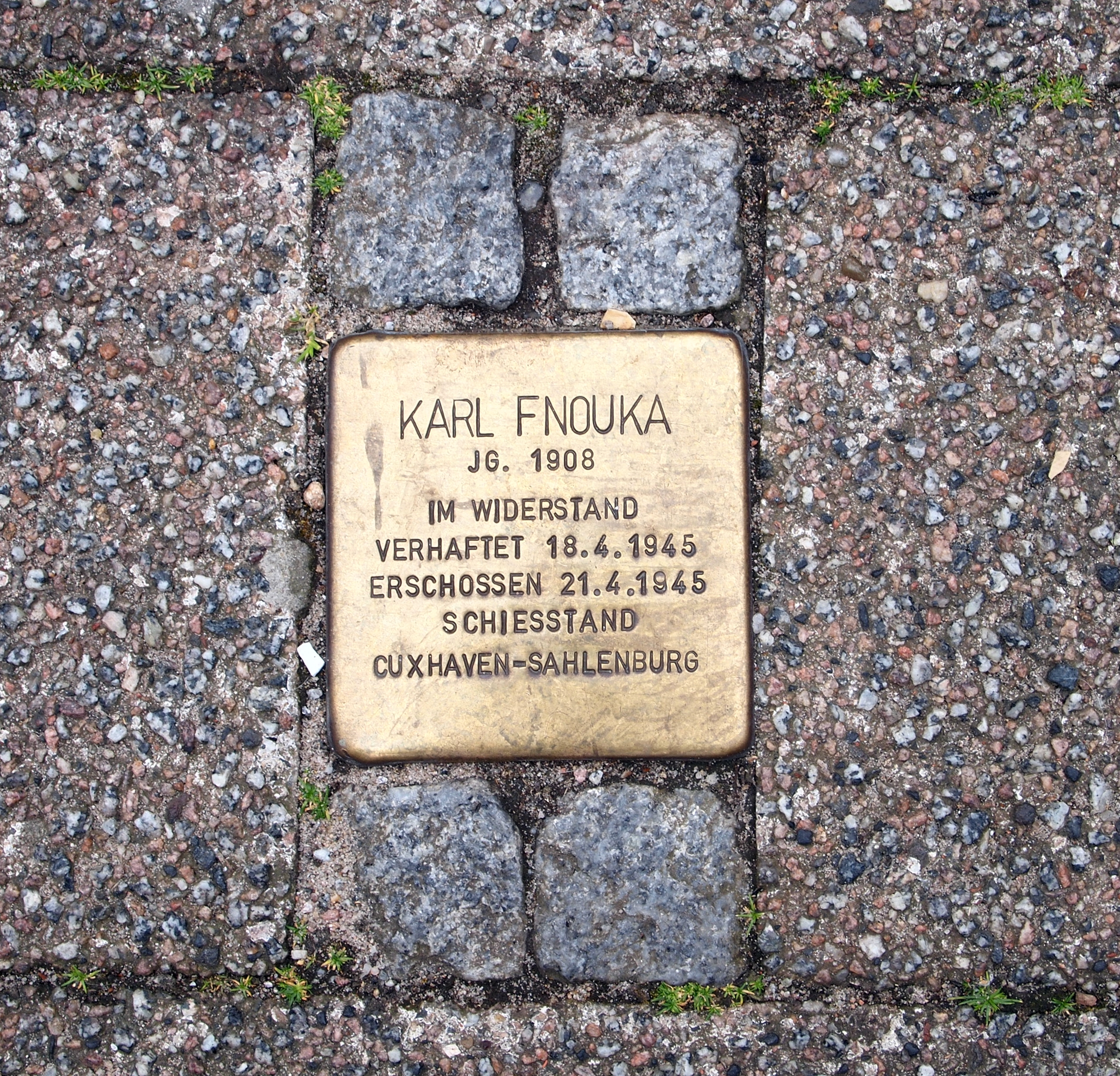 Stolperstein auf Helgoland für Karl Fnouka, Lung Wai Ecke Bremerstraße, vor dem Fahrstuhl, Unterland